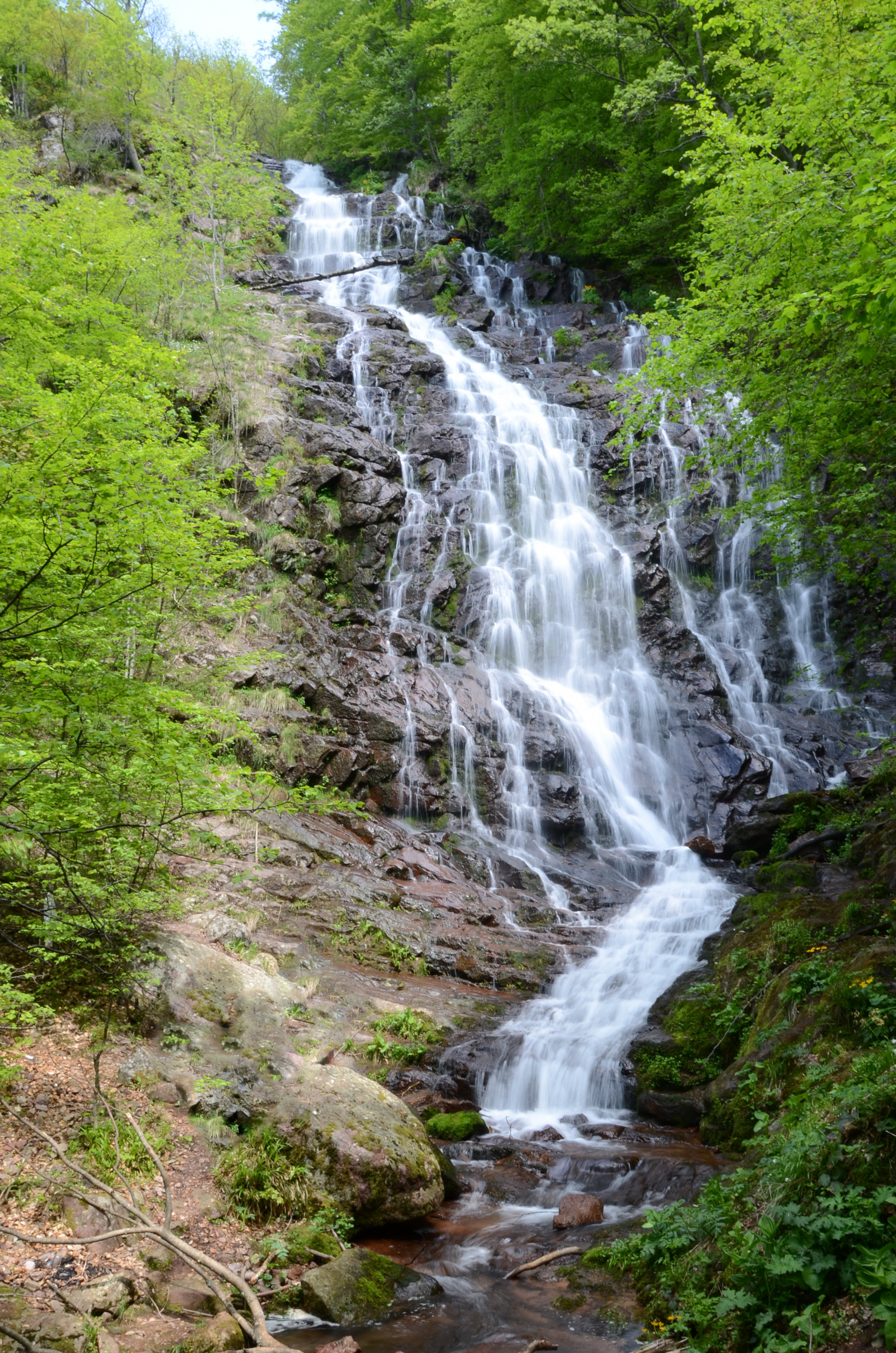 Српски (ћирилица): Ово је фотографија заштићеног природног добра у Србији под шифром: ПП16 This is a a photo of a natural area in Serbia with ID: ПП16 Пиљски водопад на Старој планини. Налази се источно од села Топли До на 1450 метара надморске висине. Висина водопада је 68 метара.